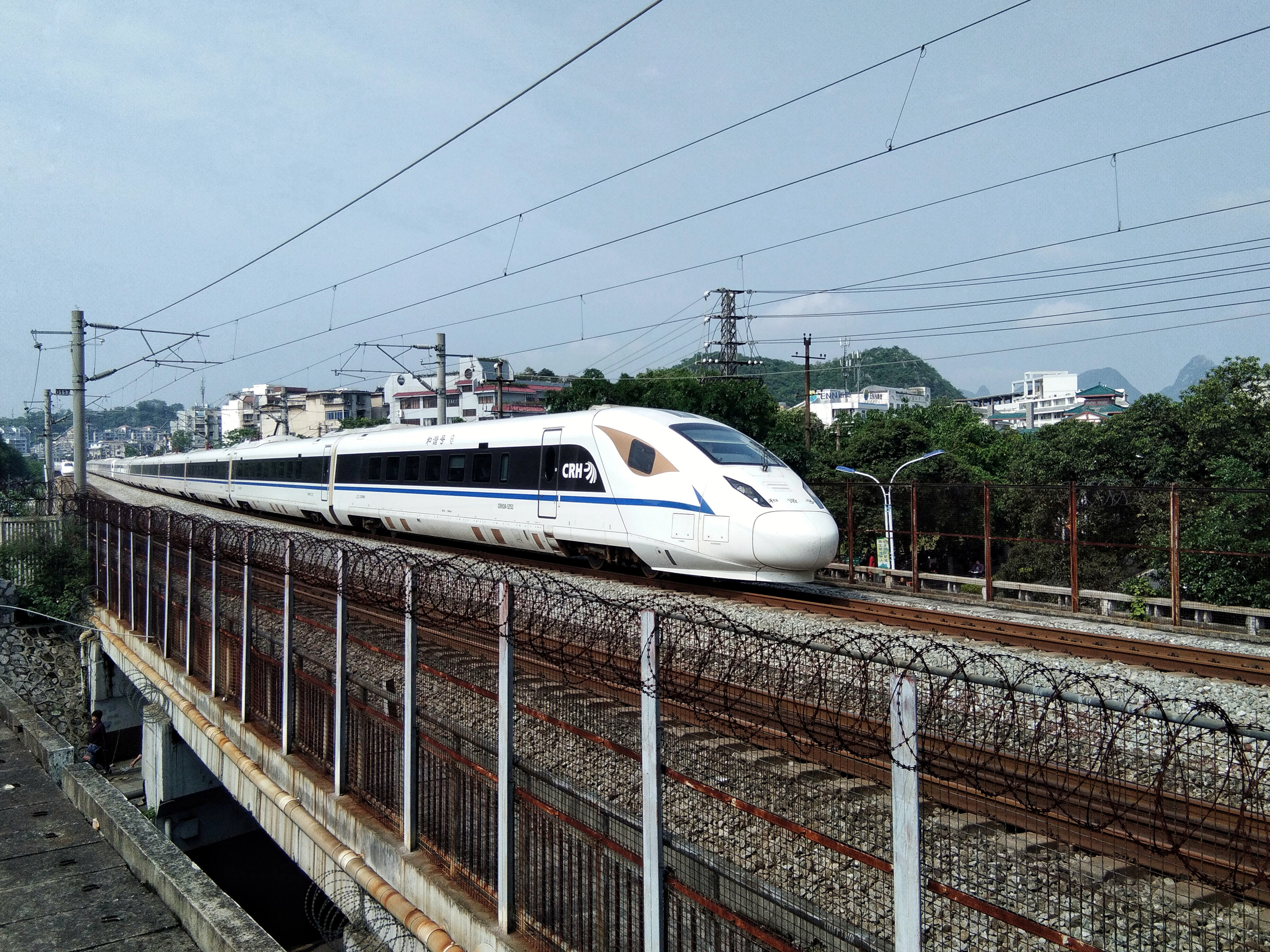 CRH3A-3106与CRH3A-5253重联担当D1782/1783次列车通过桂林市秀峰区丽君路铁路桥，前往成都东站。